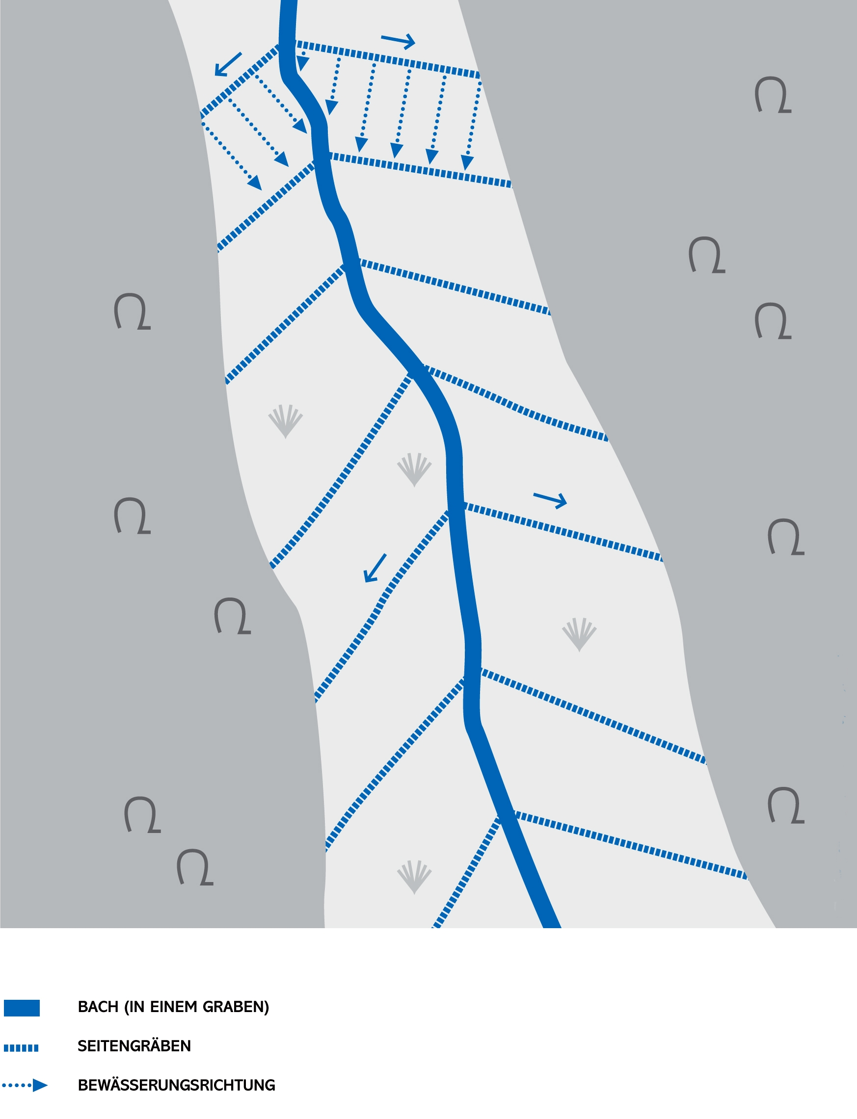 Wiesenbewässerung in den Seitentälern der Clerve, Luxemburg